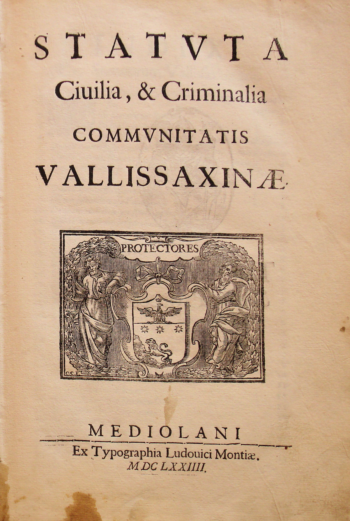 Statuta civilia et criminalia communitatis Vallissaxinae, 1674